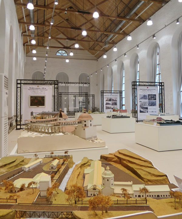 Экспозиция музея архитектуры и дизайна УрГАХУ, Екатеринбург, ул. Горького 4А